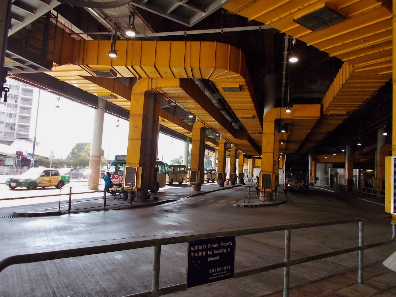 三聖巴士總站(2019年)